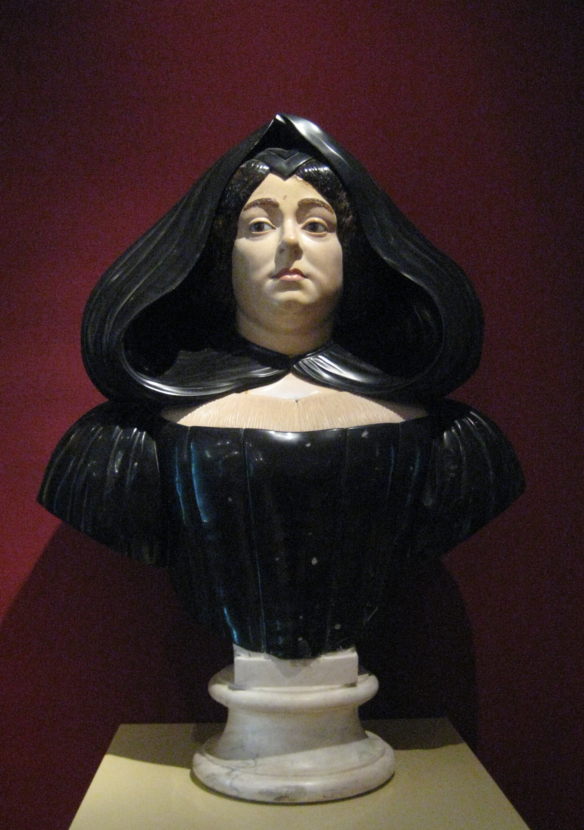 Джузеппе Антонио Торричелли. Бюст Виттории делла Роавере. Ок. 1597. Полудрагоценные камни. Музей серебра, Палаццо Питти.